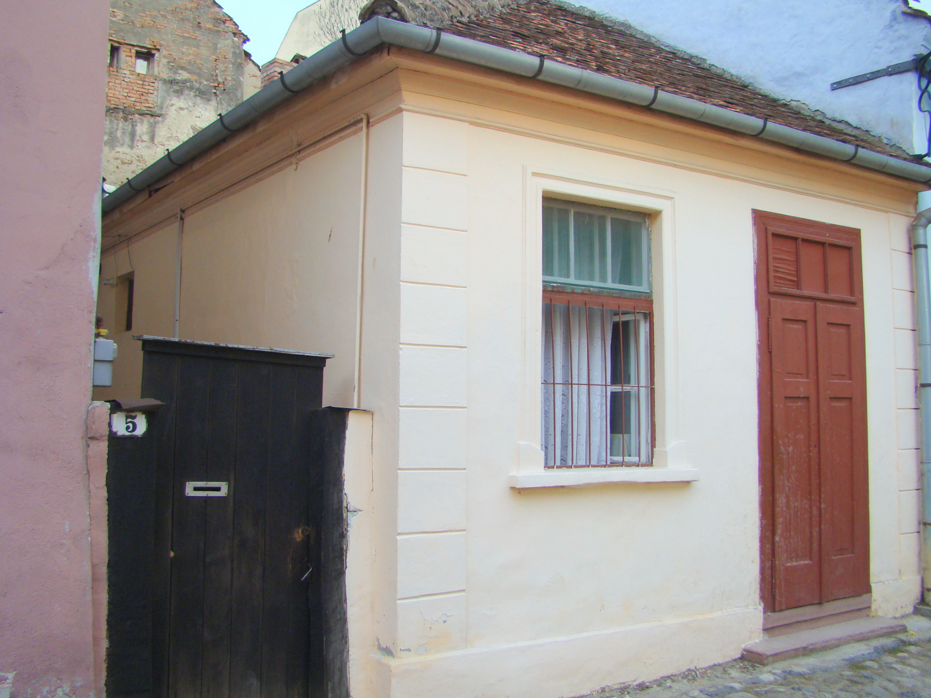 Casă, municipiul Sighișoara, str. Tâmplarilor 5 1600 - 1650, sec. XX